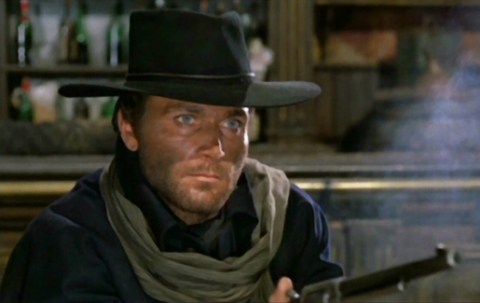 Django (részlet)